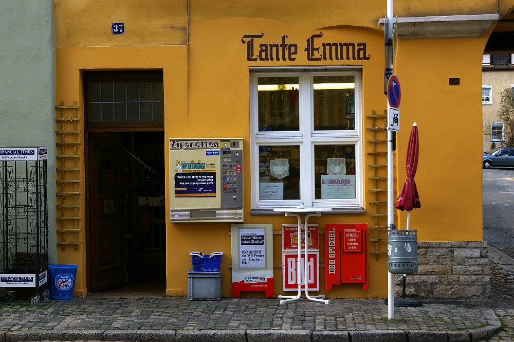 Tante-Emma-Laden, Bamberg